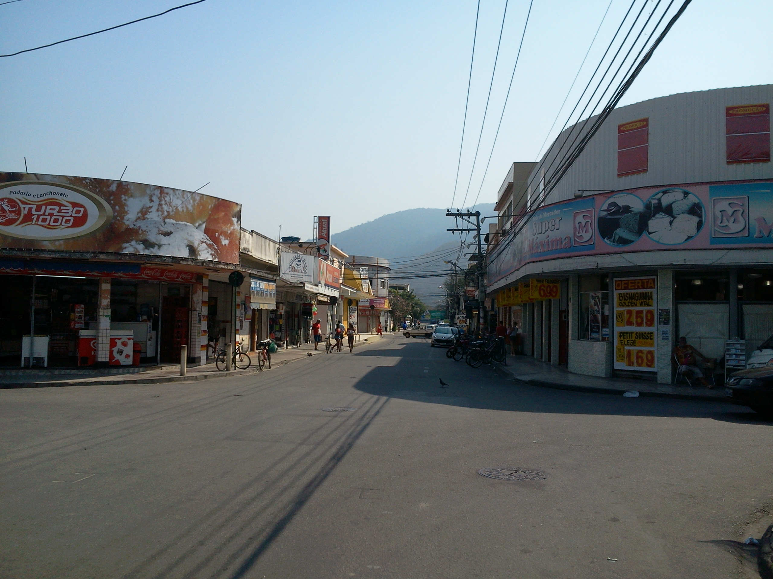 Foto do centro do bairro Vila Emil, Mesquita-RJ.